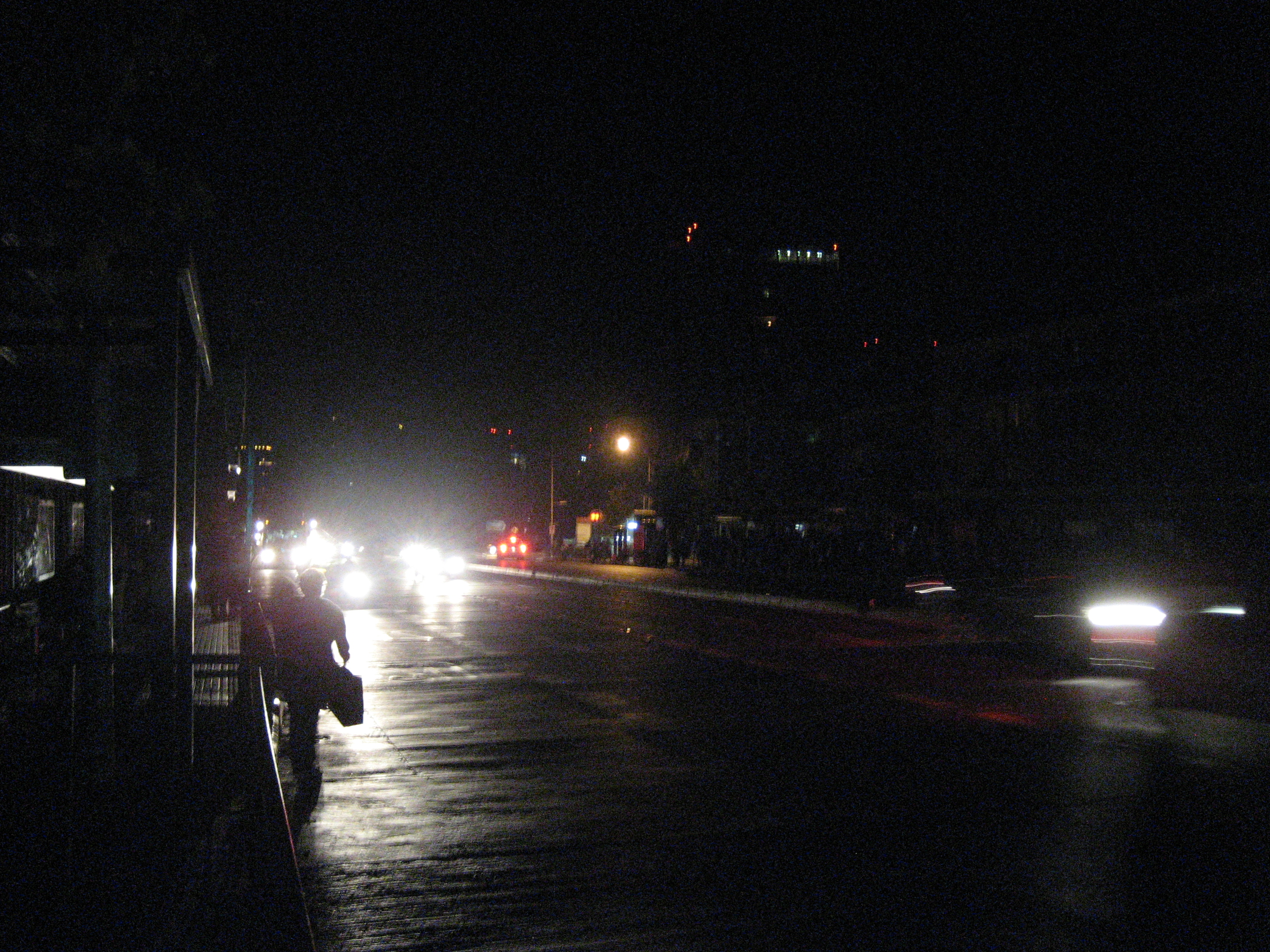 Apagón eléctrico del 14 de marzo de 2010 en Santiago, Chile.